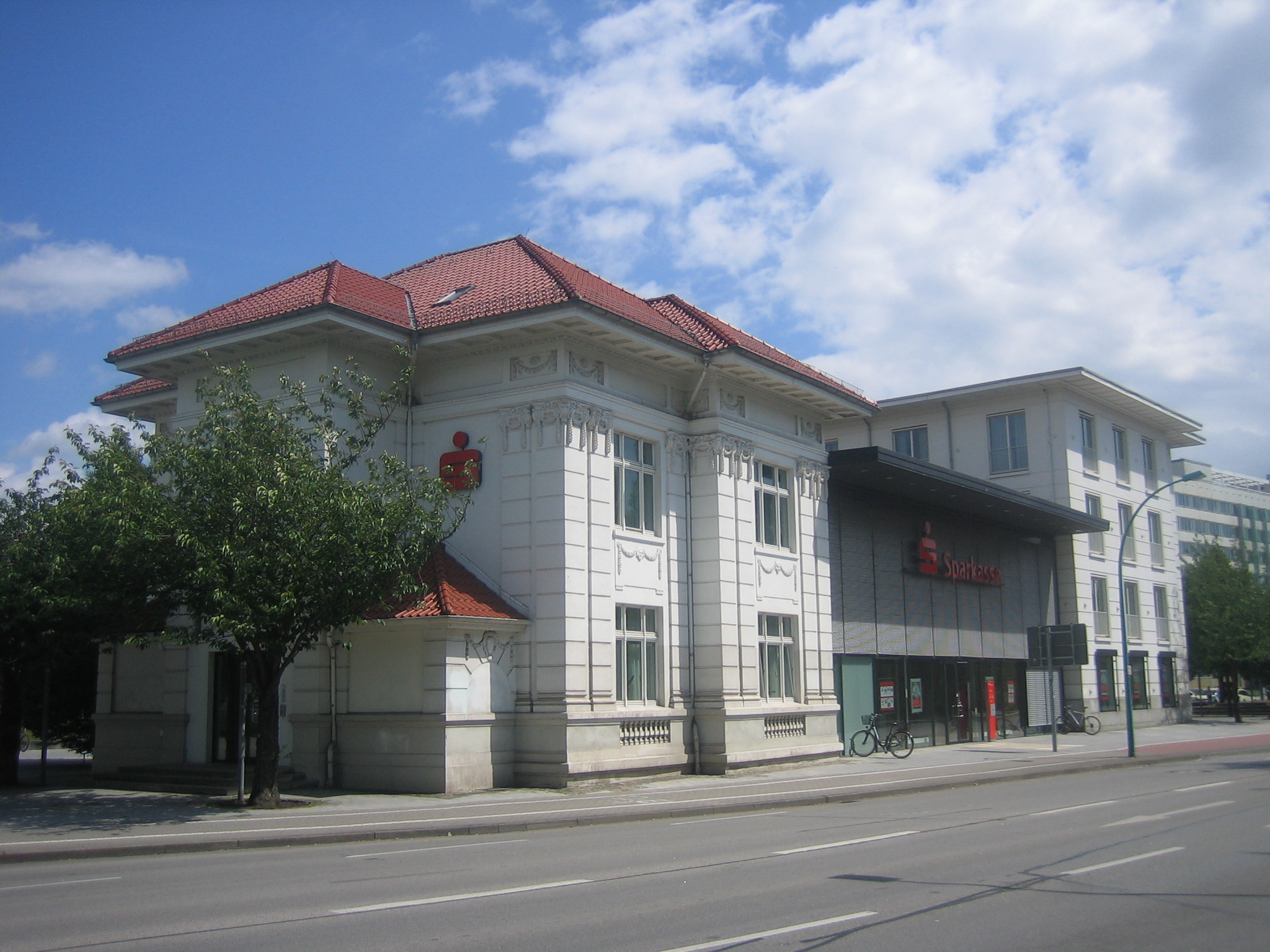 Löwenvilla (Sparkassenfiliale), Friedrich-Engels-Ring 54, Neubrandenburg, Mecklenburg-Vorpommern